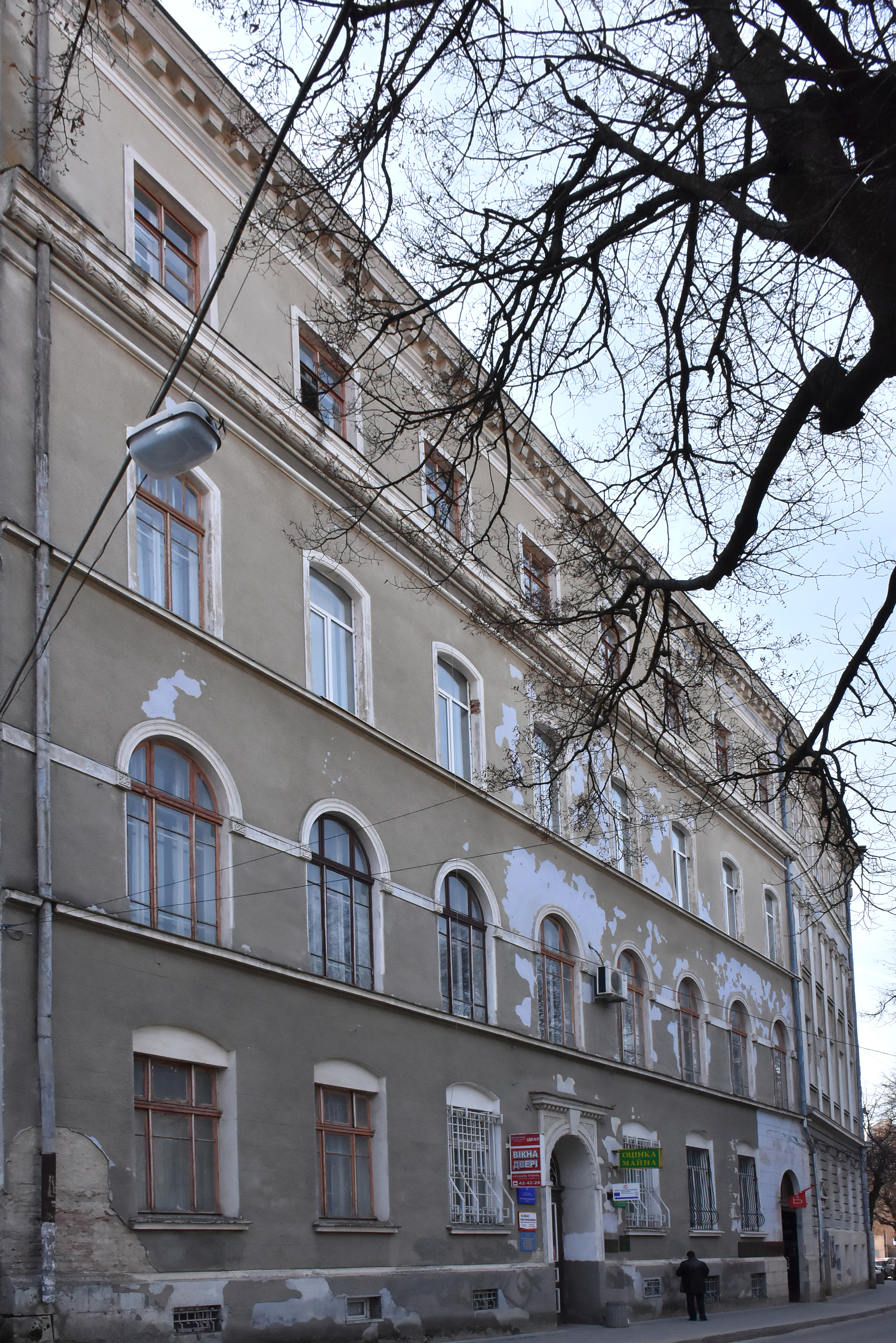 Адміністративний будинок у Тернополі на бульварі Тараса Шевченка, 1.